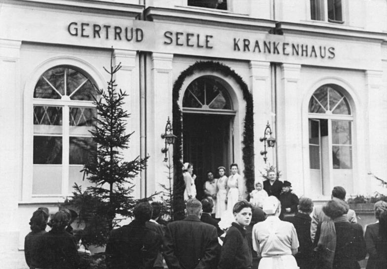 Bernau, Schloss Lanke, Tbc-Krankenhaus, Umbenennung Illus Kümpfel 12.1.51 Gertrud-Seele-Krankenhaus in Lanke (Bernau). Am 12.1.51 erhielt die Tuberkulose-Abteilung des Städtischen Krankenhauses Prenzlauer Berg in Lanke bei Bernau den Namen der hingerichteten Antifaschistin Gertrud Seele. UBz: Stadträtin Frau Schirmer-Pröscher spricht zu den Versammelten über die Bedeutung dieser Umbenennung.